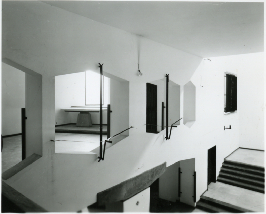 Genova. Architetto Ludovico Quaroni (con Adolfo De Carlo, Andrea Mor, Angelo Sibilla), Chiesa della Sacra Famiglia. Internie particolari architettonici. Servizio fotografico : Genova, 1960 / Paolo Monti. - Fototipi: 15 : Positivo b/n, gelatina bromuro d'argento/ carta, provino a contatto da pellicola 10x12. - ((Al verso dei provini a contatto manoscritti i numeri dei negativi corrispondenti secondo altra numerazione: 7c, 10c, 11c, 13c, 14c, 15c, 16c, 17c, 18c, 21c, 22c, 23c, 25c, 26c, 59c. - La suddetta serie è contenuta nella scatola dei contatti identificata con il n. 06; sul coperchio iscrizione didascalica manoscritta a pennarello nero: "Contatti/ Architet.". - Occasione: Documentazione per pubblicazione su periodico "Casabella", Milano, Domus. - Fonte: Rubrica di Paolo Monti: Archivio 10x12 (ultimi numerati) - dal G1 al (s.d.), presso Archivio Paolo Monti. - Fonte: Monografia di Fleming John, Honour Hugh, Pevsner Nikolaus: Dizionario d'architettura, Torino, Einaudi (1981). - Fonte: Periodico: Casabella, Milano, Domus (s.d.). - Fonte: Fogli pinzati di Paolo Monti: I. Carteggi/ Einaudi/ Elenco foto disponibili per il Dizionario di Architettura (s.d.), presso Archivio Paolo Monti